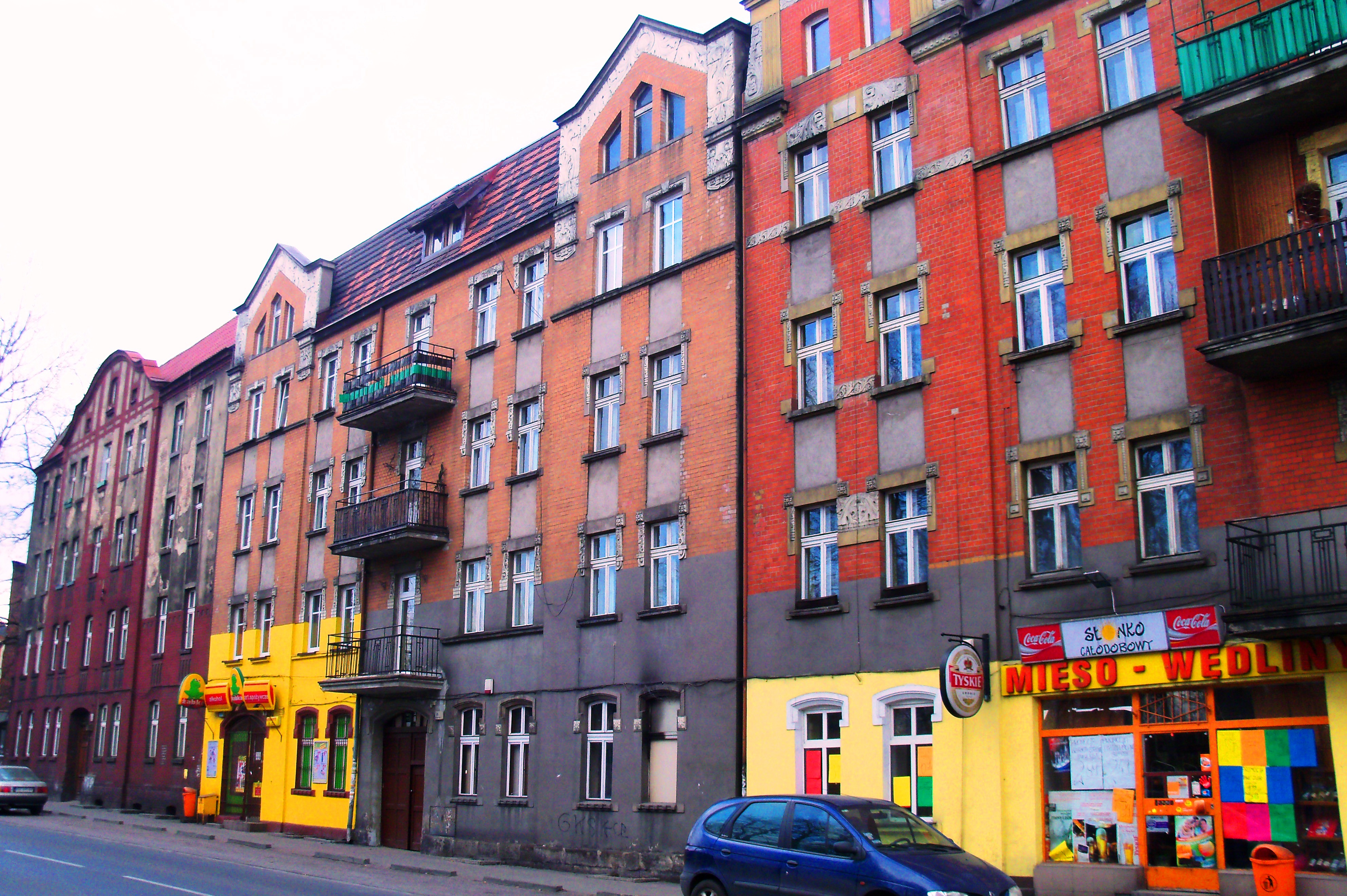 Ulica Strzelców Bytomskich w Katowicach-Dąbrówce Małej